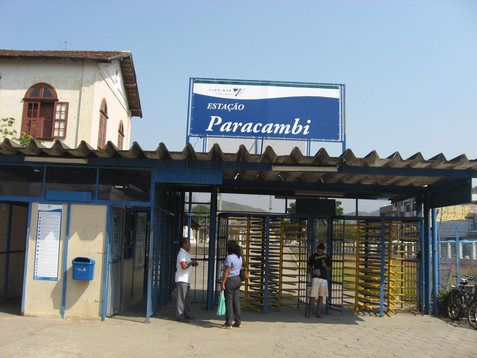 Estação Paracambi.